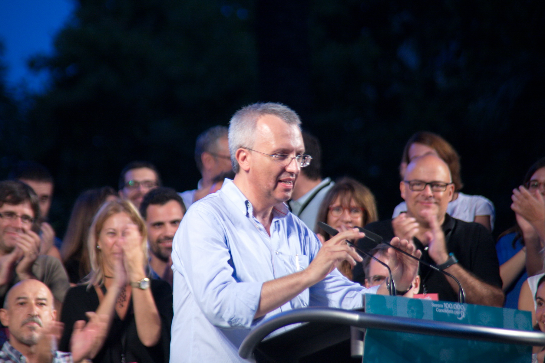 Josep Maria Forné a l'acte de presentació de tots els candidats de la llista Junts pel Sí a Barcelona, al Psg.Lluís Companys. (28-8-2015)